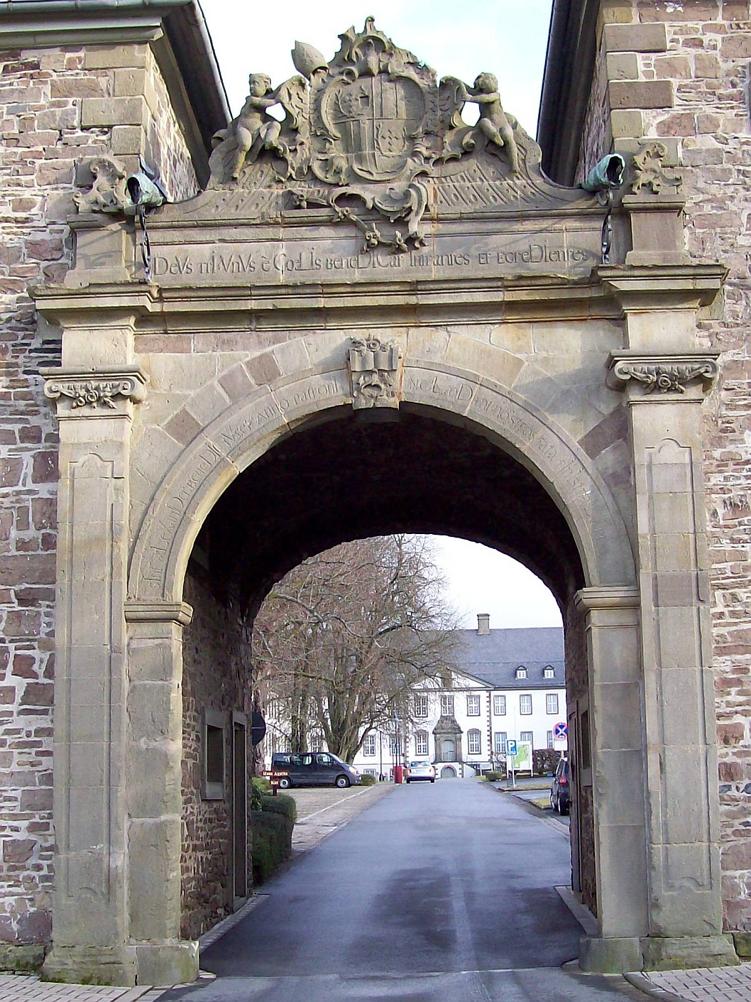 Kloster Grafschaft in Schmallenberg, Einfahrt Torhaus (Germany)